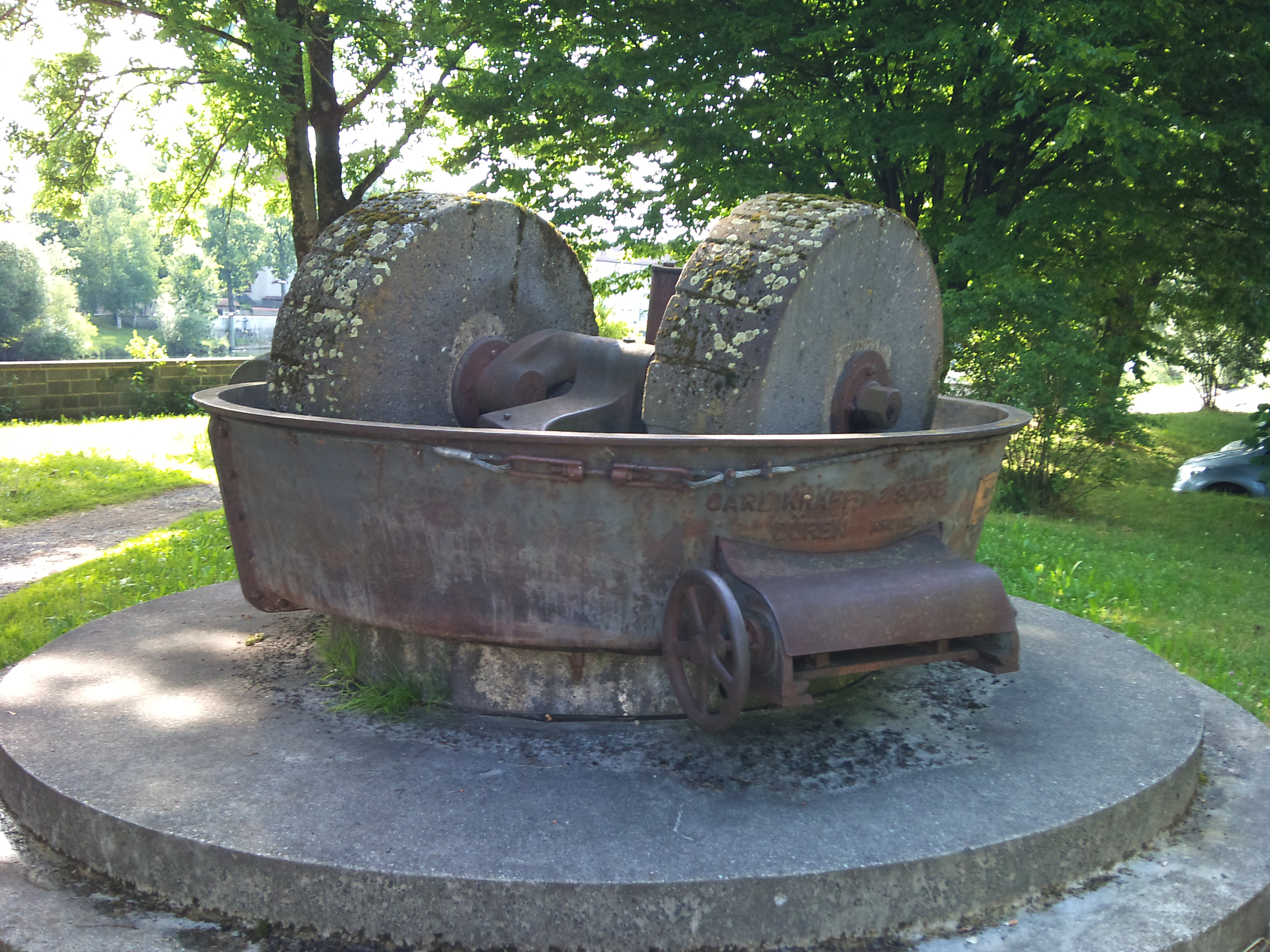 Kollergang zur Papierherstellung